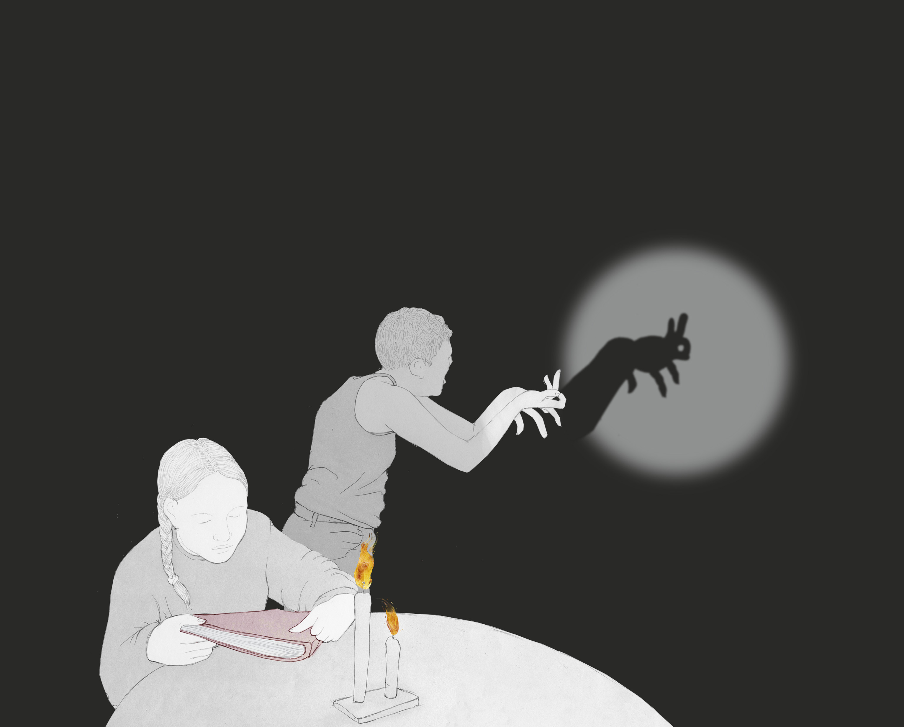 El joc a les societats rurals. La imatge busca il·lustrar el procés de joc, tant la creació de regles com la cerca de materials per a crear joguets. Cada imatge il·lustra diferents activitats que a dia de hui serien considerades perilloses o inapropiades. Autor de la il·lustració: Andrés Marín Jarque